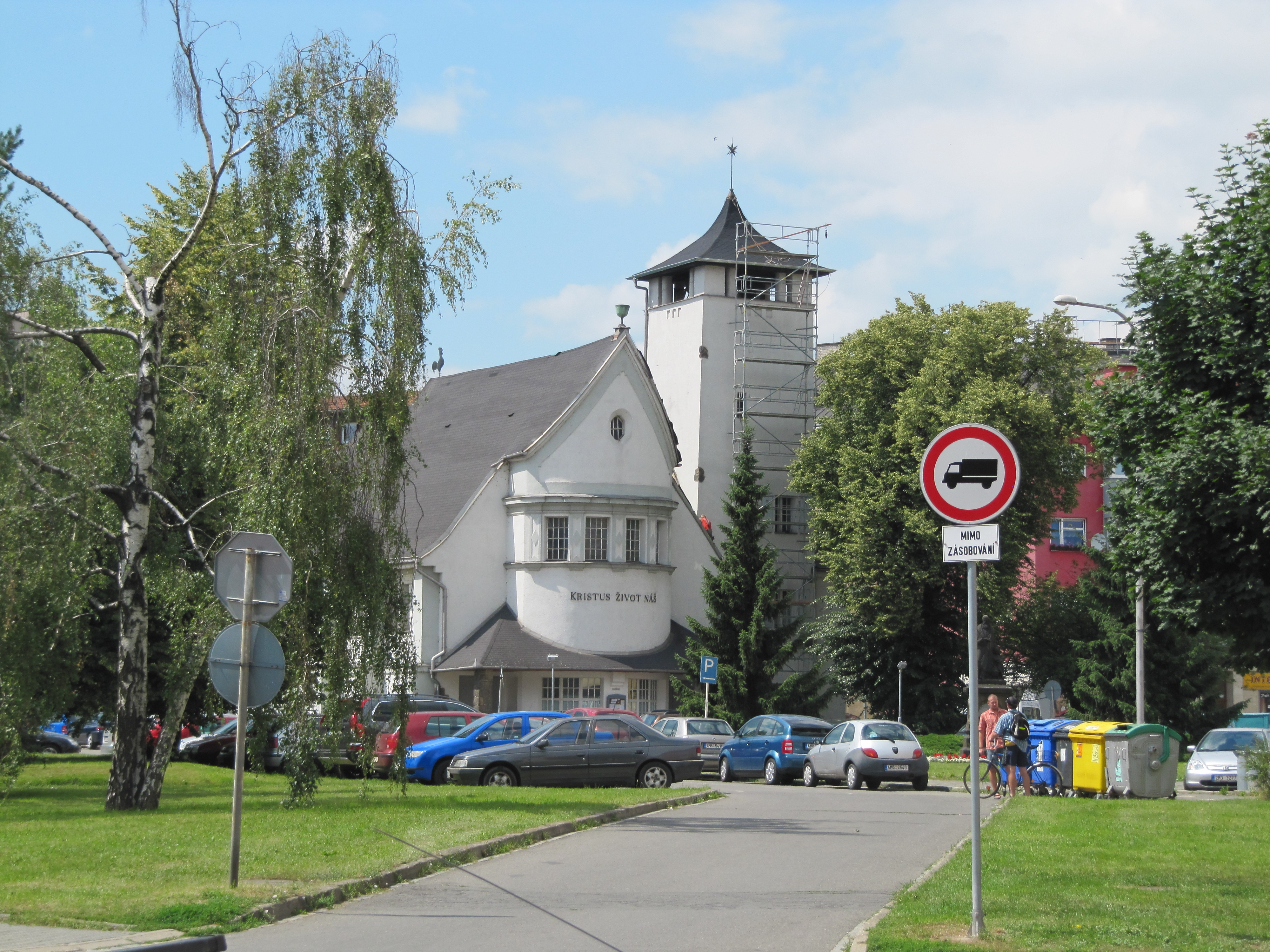 Přerov, evangelický kostel